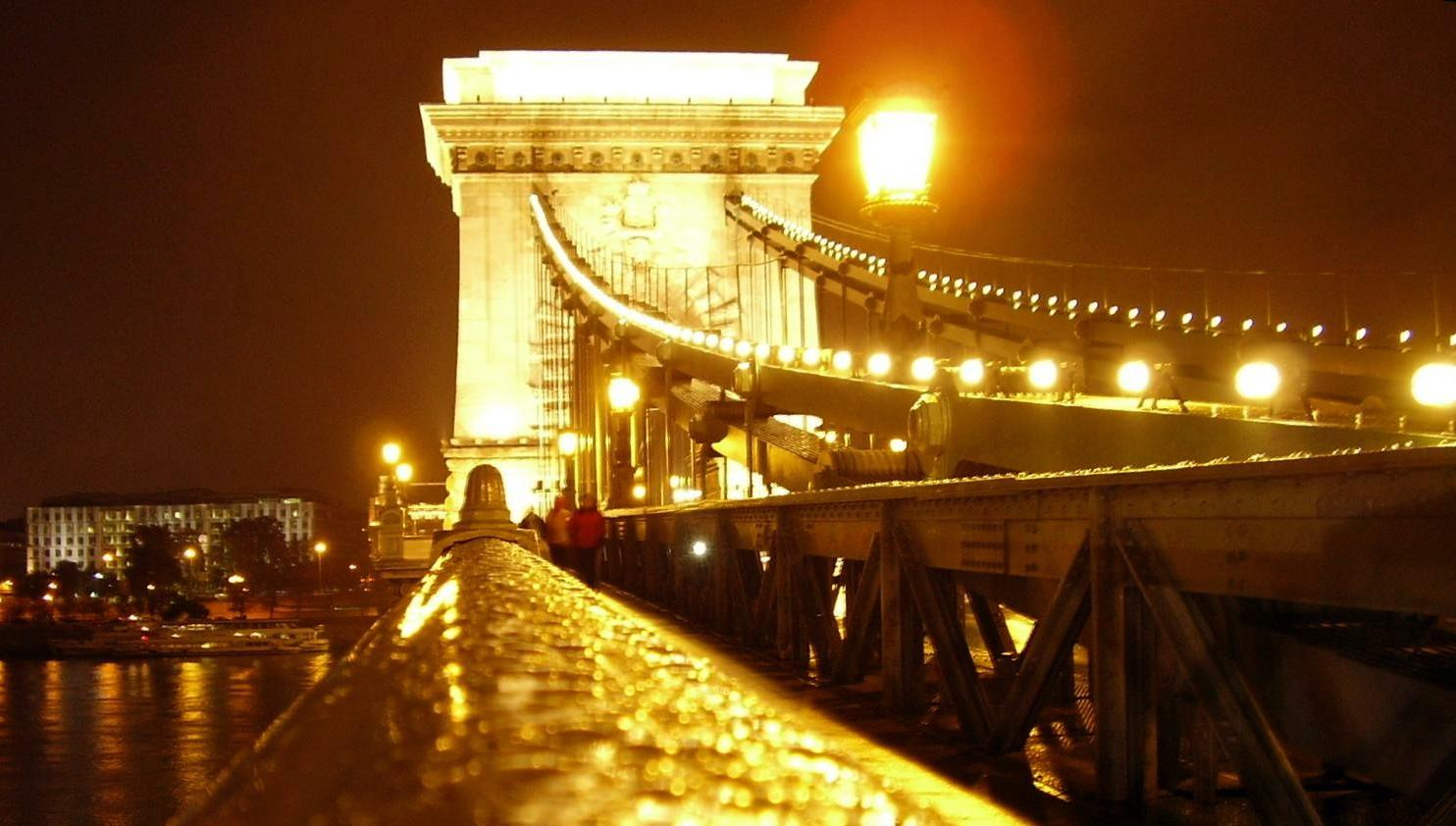 Budapest 4 november 2006